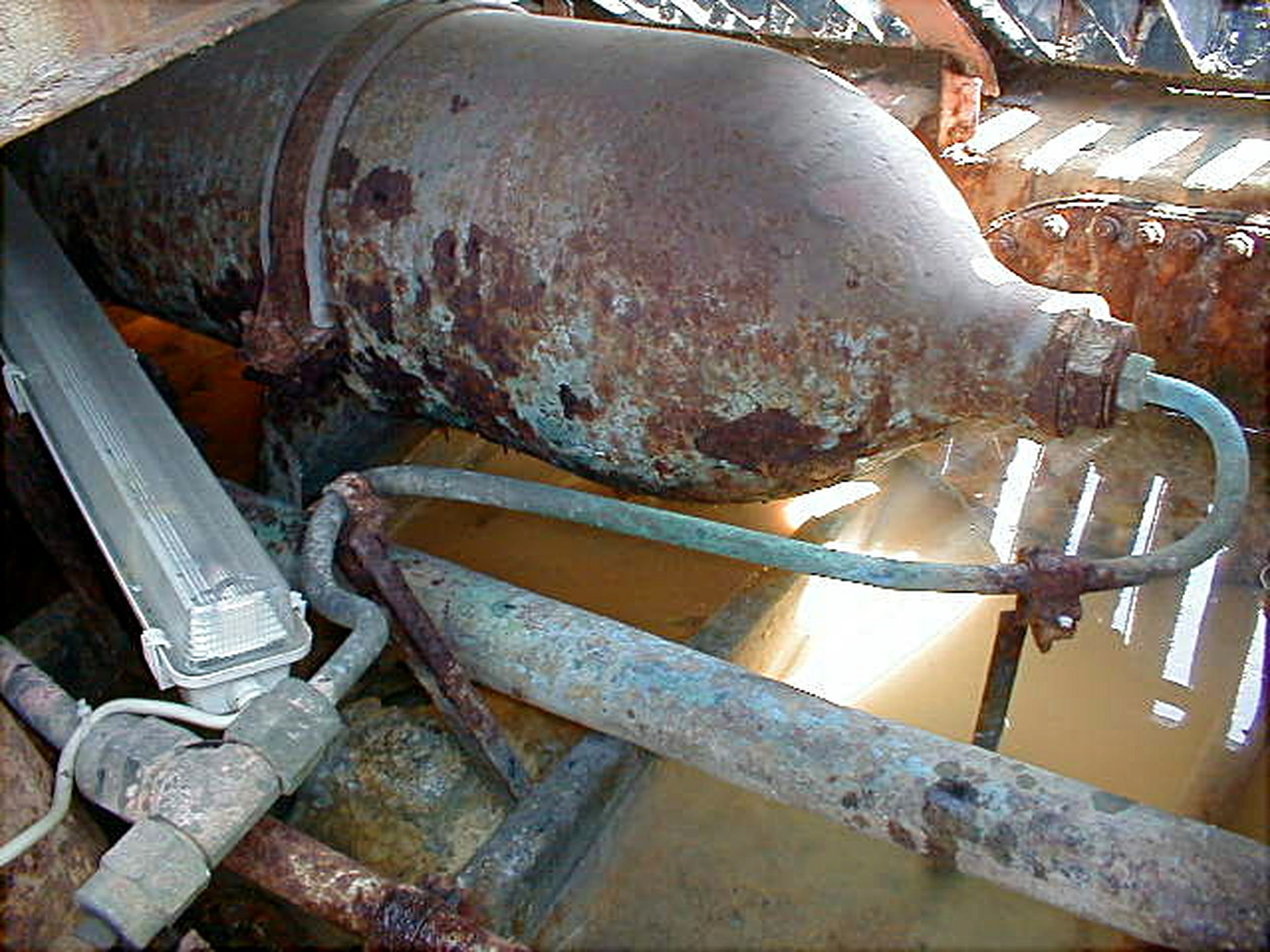 Sous marin conventionnel Russe de classe FoxTrot ici FoxTrot 480 servant de musée et amarré à Zeebruges